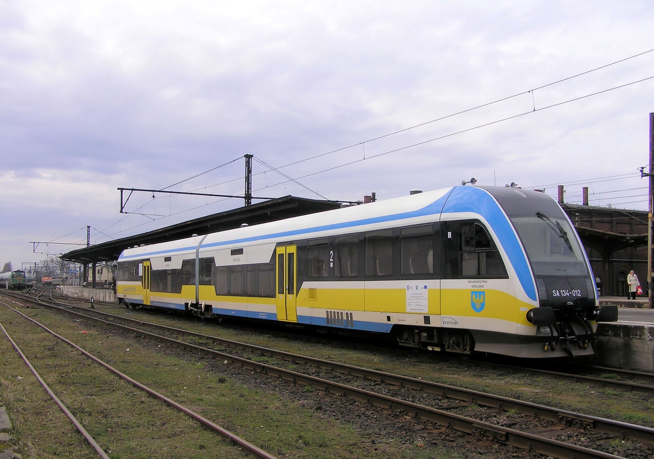 SA 134-012 na stacji w Brzegu.